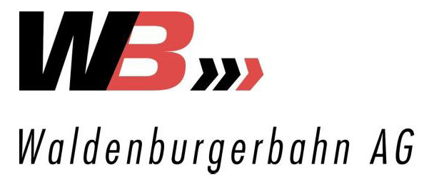 Logo Waldenburgerbahn